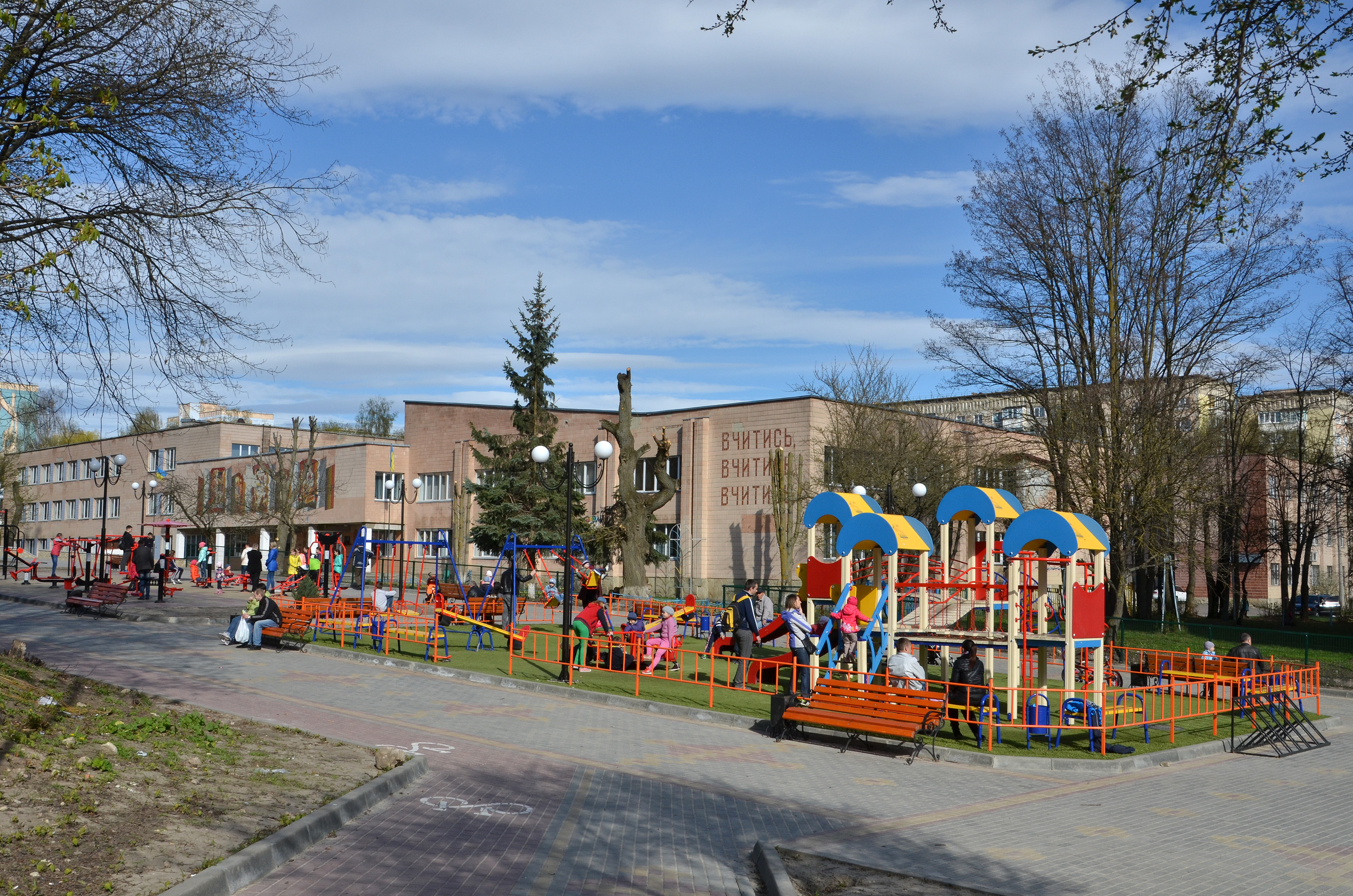 Загальноосвітня школа № 22 на бульварі Симона Петлюри в Тернополі.